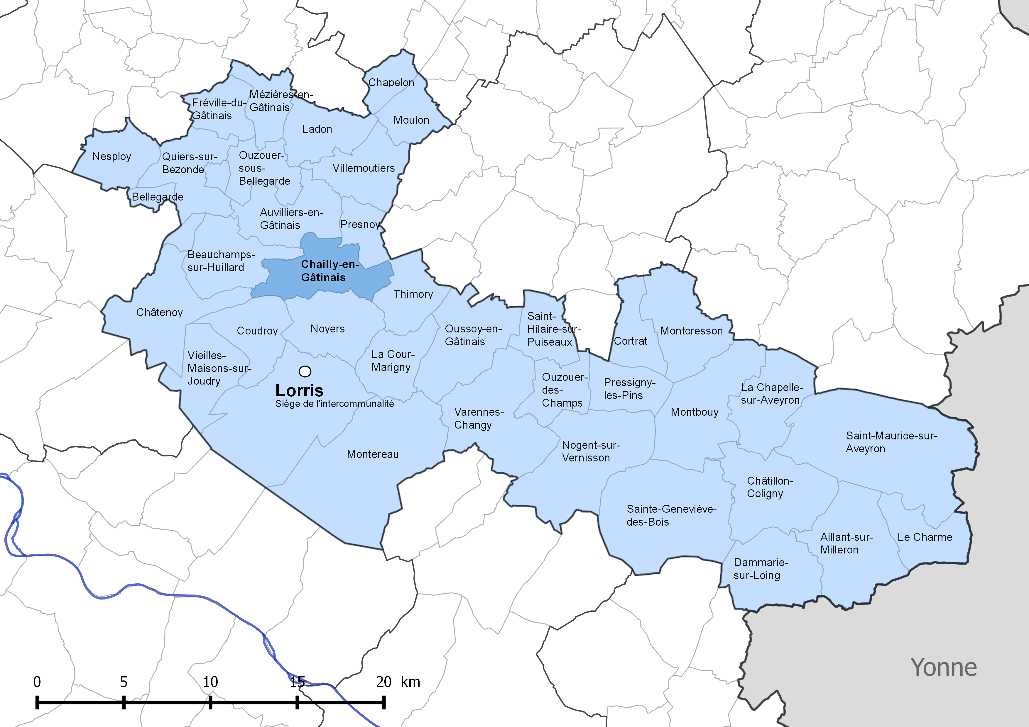 Périmètre de la communauté de communes Canaux et forêts en Gâtinais - Situation de la commune de Chailly-en-Gâtinais.